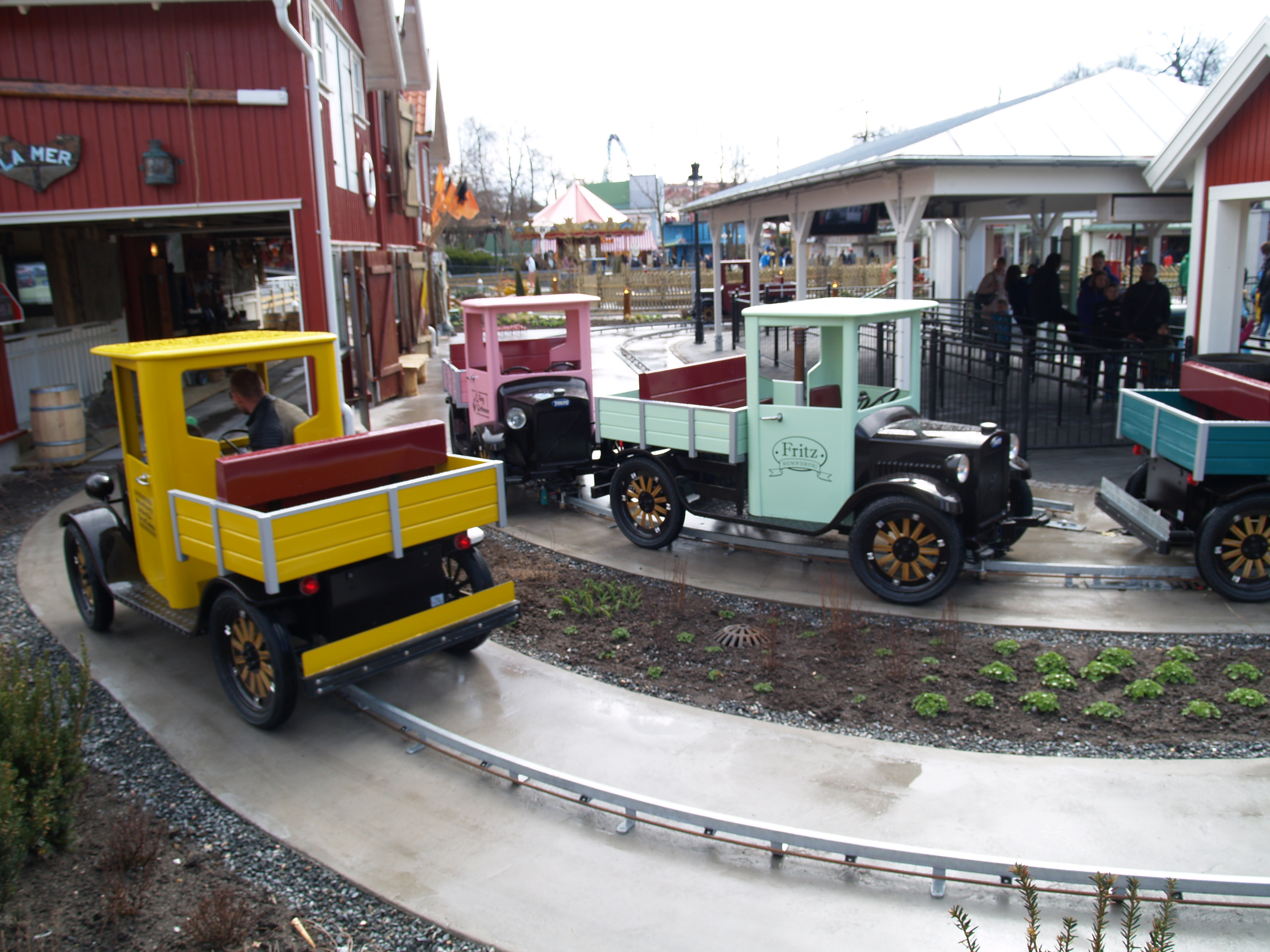 Farfars bil, Liseberg.